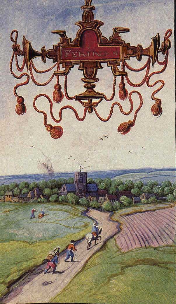 Ferin Cartulaire du Duc de Croÿ